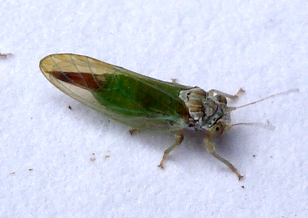 Puszpáng-levélbolha (Psylla buxi) Order: Hemiptera Date: July 29, 2008 Recorder: Mick E. Talbot Determiner: Species: Mick E. Talbot Gender: Male Abundance: Yes Habitat: Parkland on Box Location: Boultham Park, Lincoln, LN6, VC53 Grid Reference: SK96376909